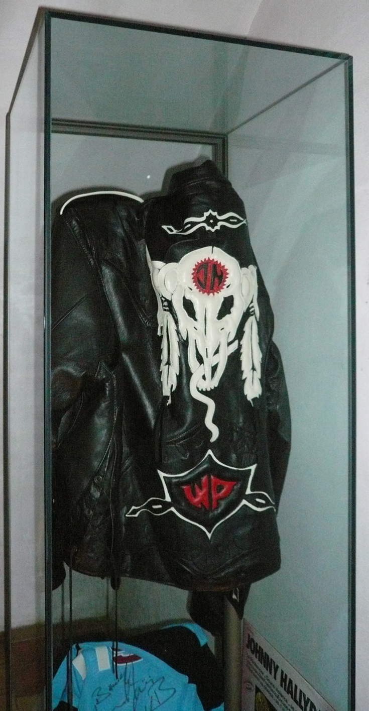 Blouson porté par Johnny Halliday lors de sa tournée de 1992. Actuellement exposé au Musée d'art sacré du Gard à Pont-Saint-Esprit (Gard, France)